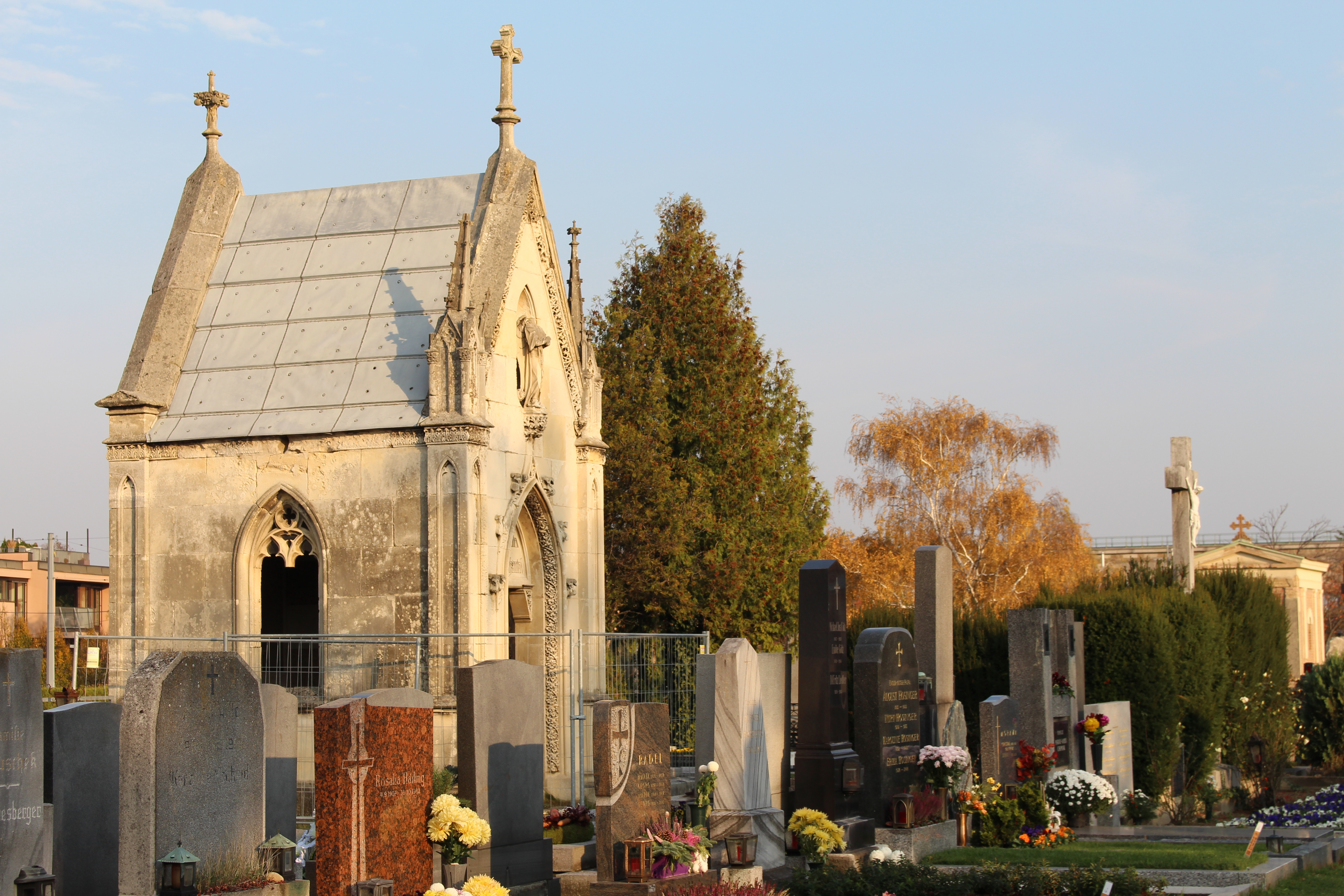 Friedhof Rodaun im 23. Wiener Gemeindebezirk Bild 19